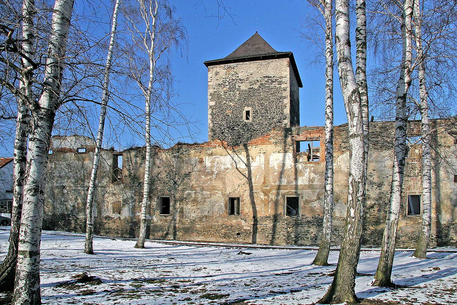 Věž tvrze v obci Lošany v okrese Kolín